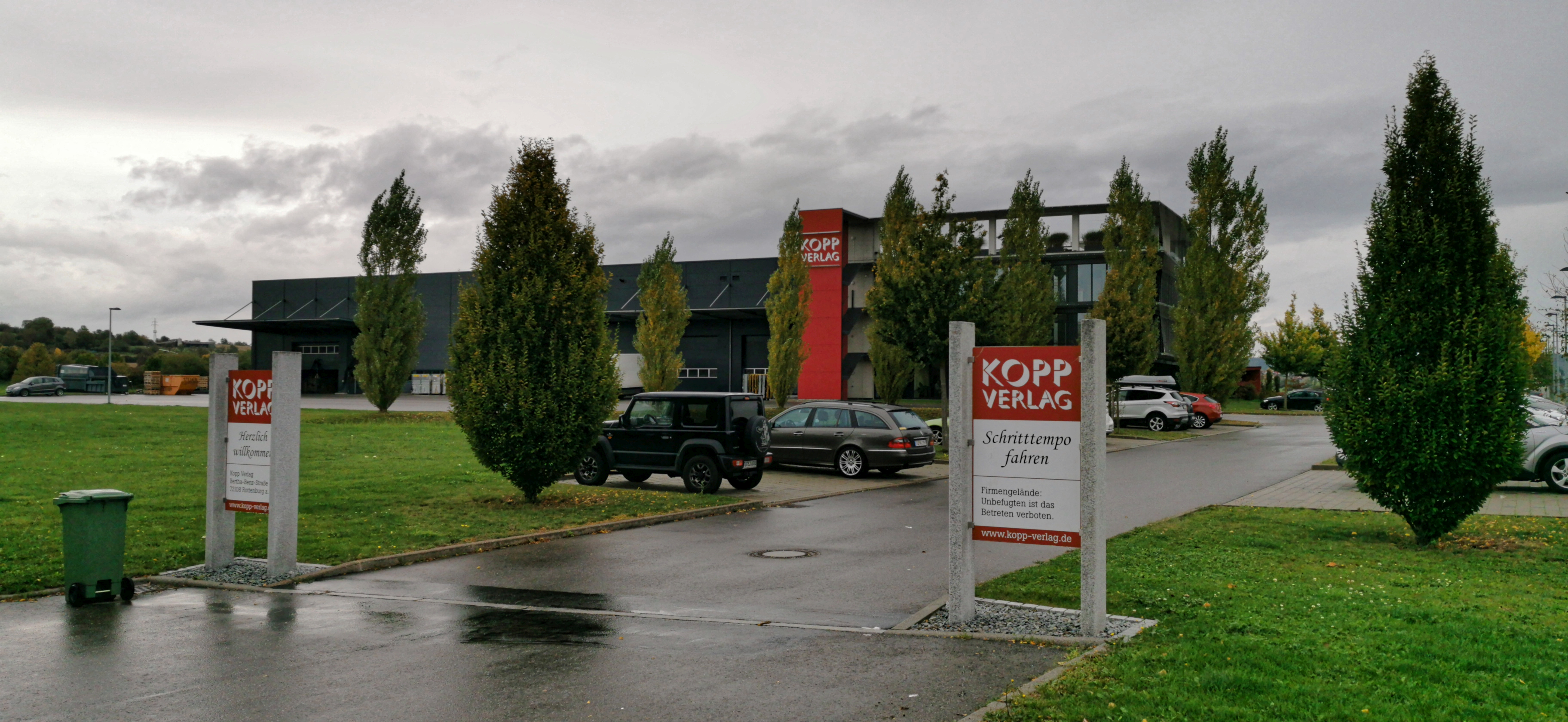 Rottenburg am Neckar 2019